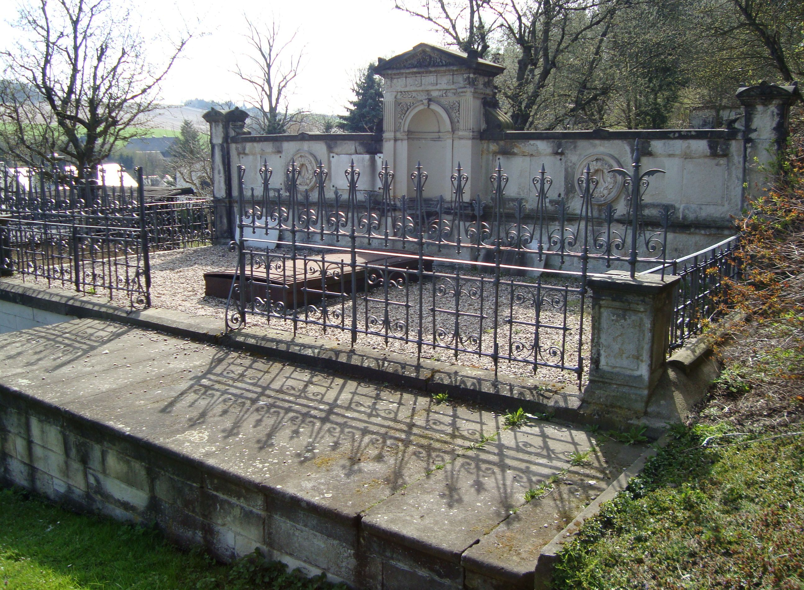 Erbbegräbnis der Familie Solbrig (u.a. Carl Friedrich Solbrig) auf dem alten Friedhof von Chemnitz-Harthau